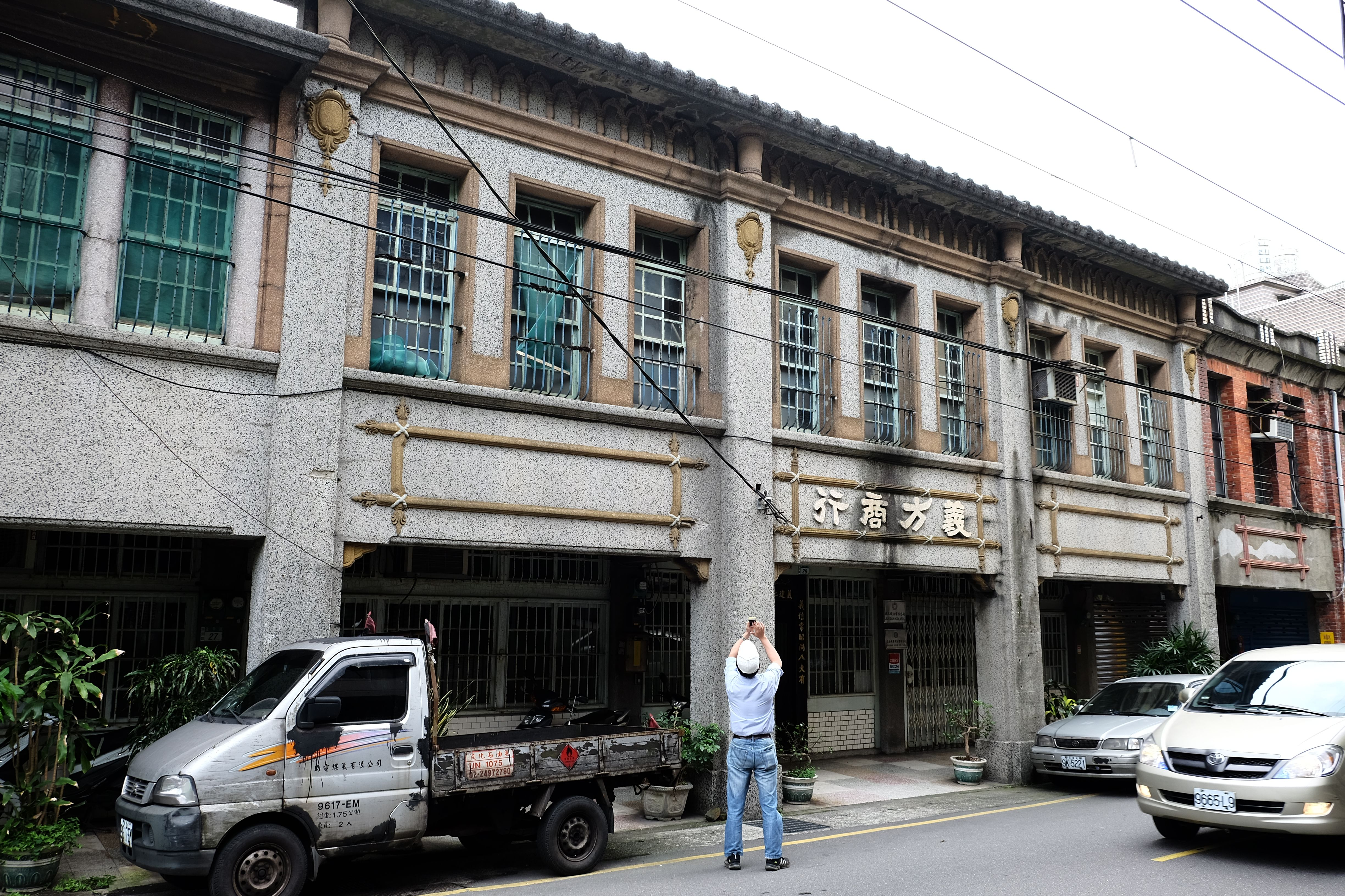 中文（台灣）: 瑞芳義方商行